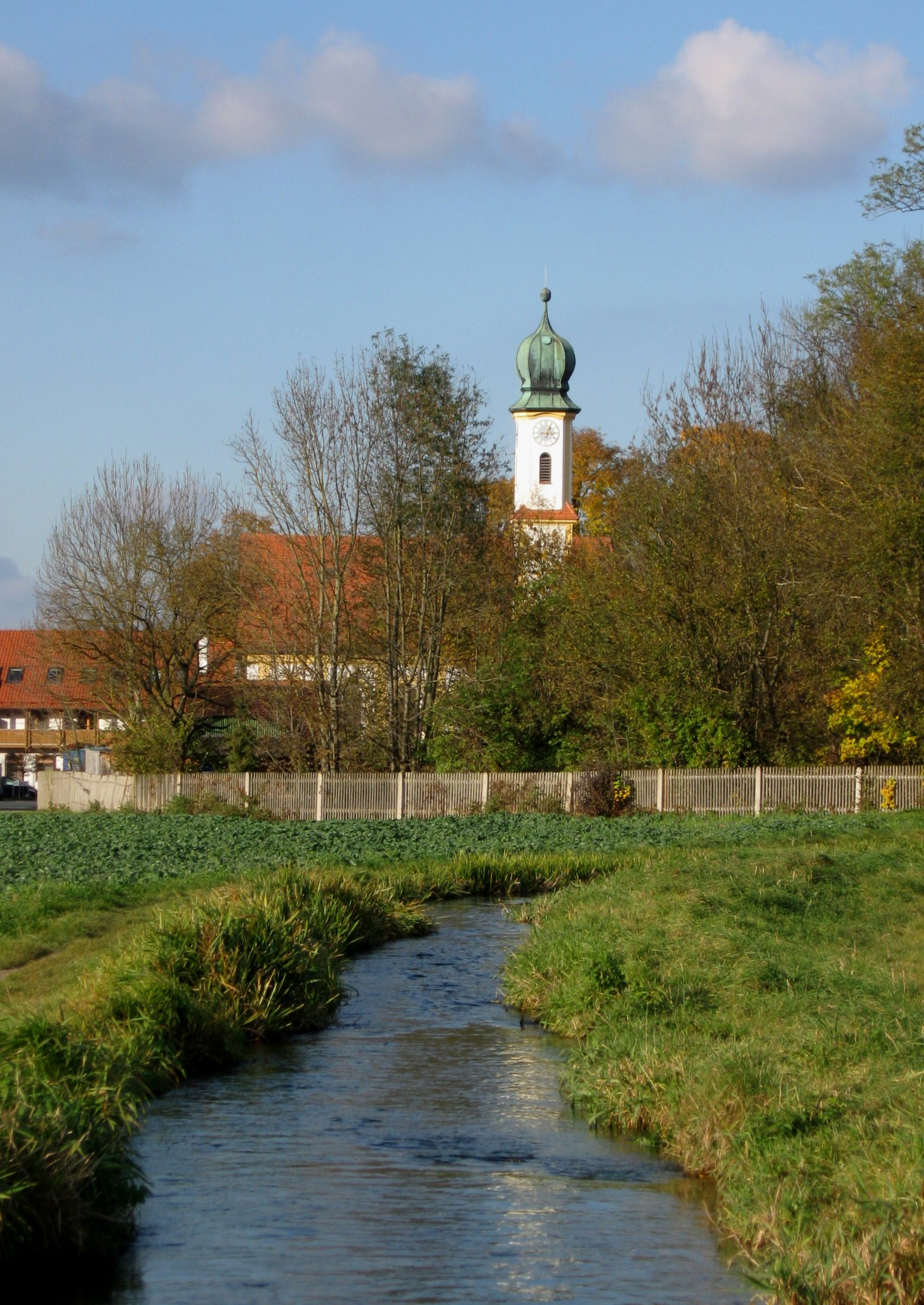 Unterbiberg, Hachinger Bach, Kirche St. Georg